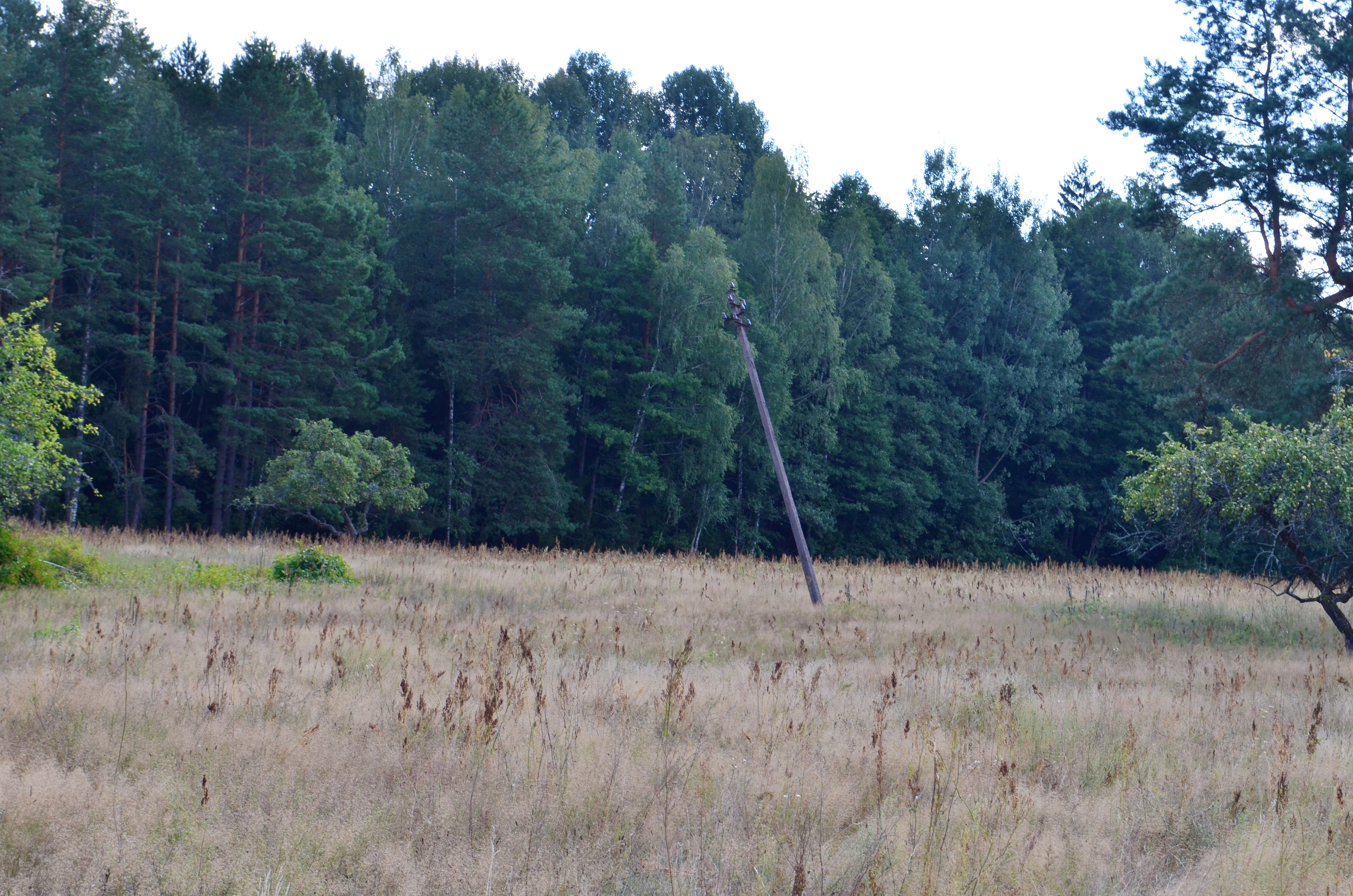 Buv. Pogarendos kaimas, Varėnos raj.